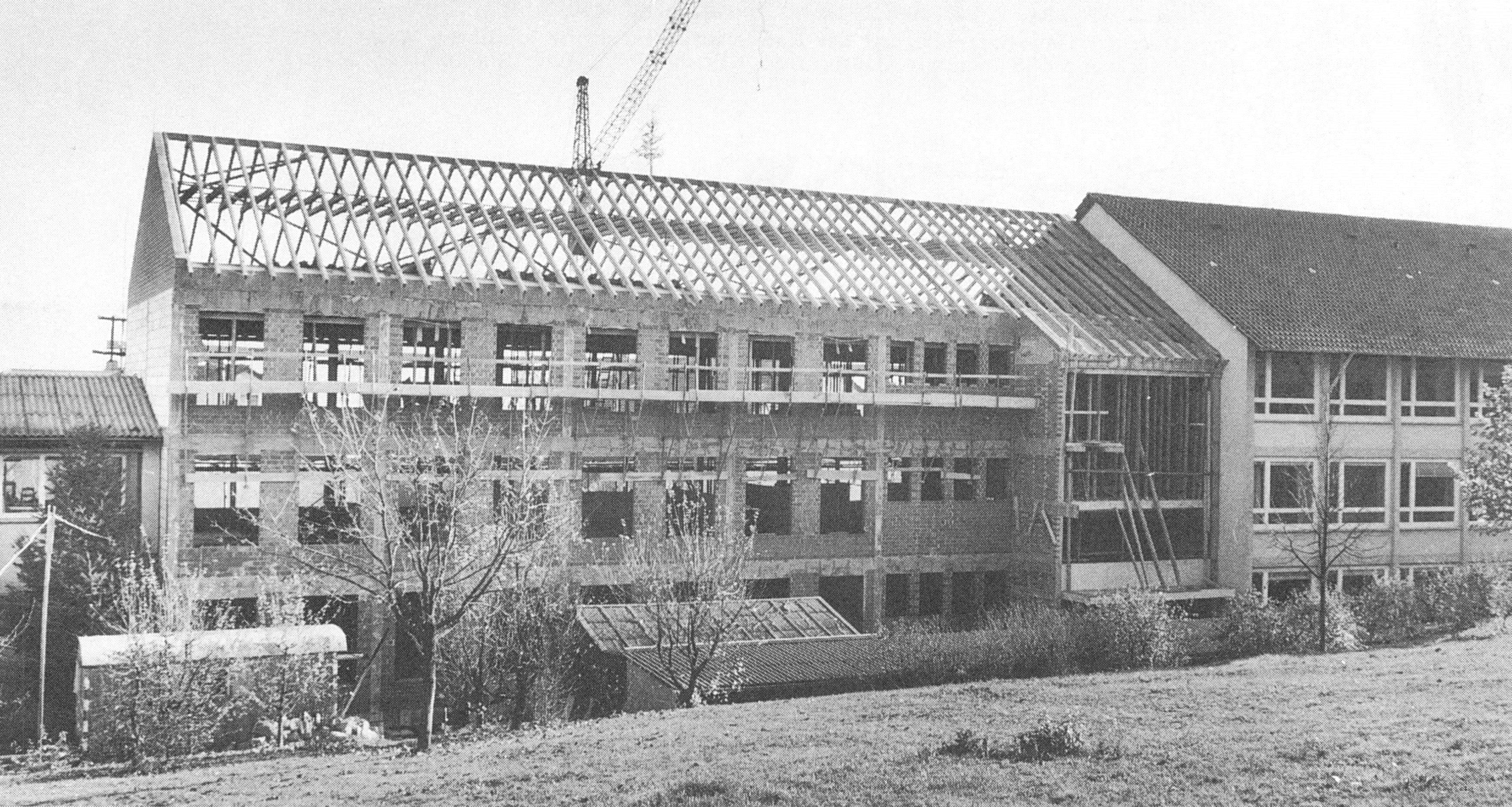 KSTBB Handels- und Höhere Handelsschule mit einem Gemeinschaftshaus, Teil der Geschichte der Kaufmännischen Schule Tauberbischofsheim